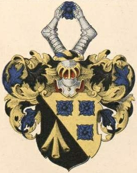 Hagemeisteri suguvõsa aadlivapp